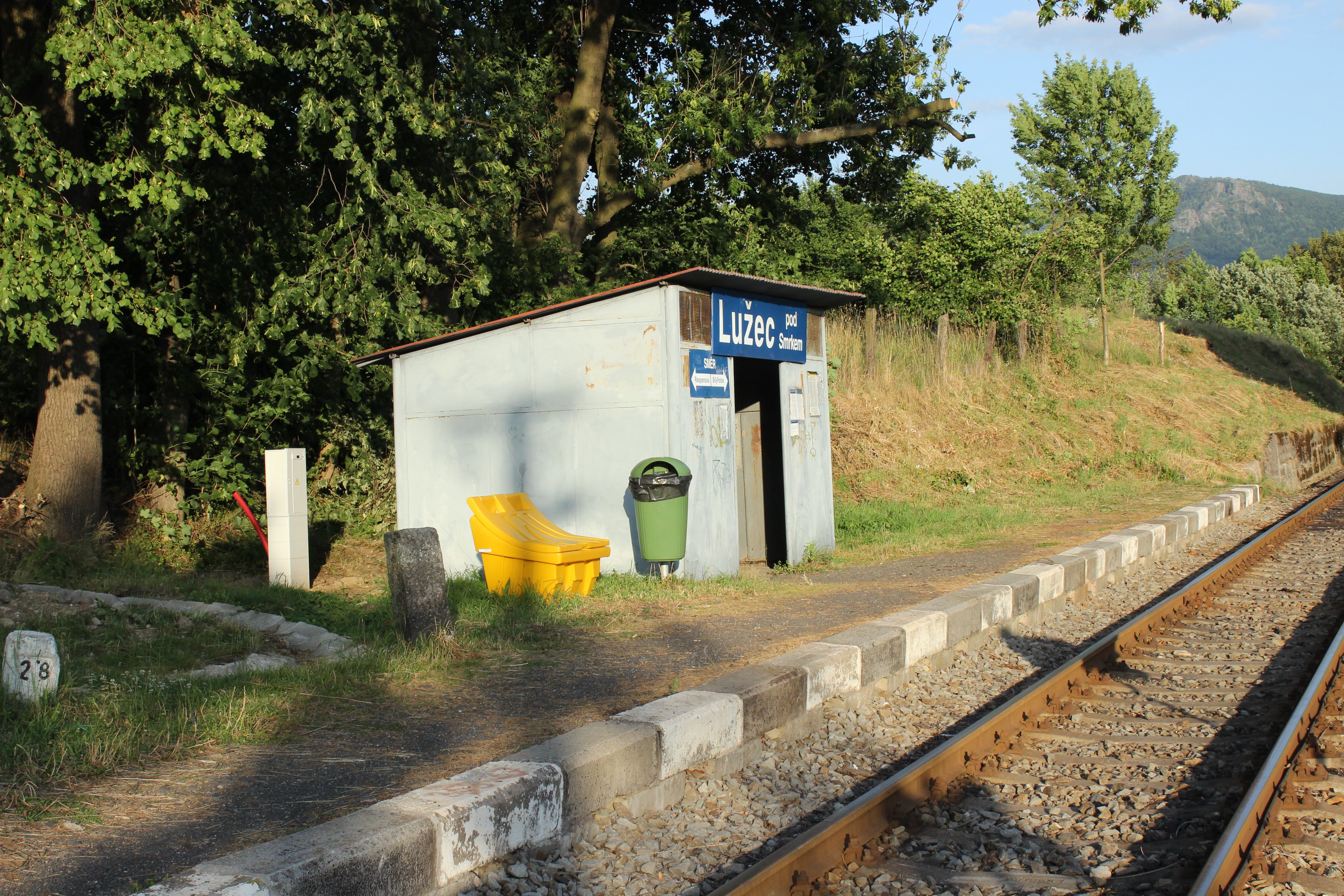 Nástupiště v železniční zastávce Lužec pod Smrkem.